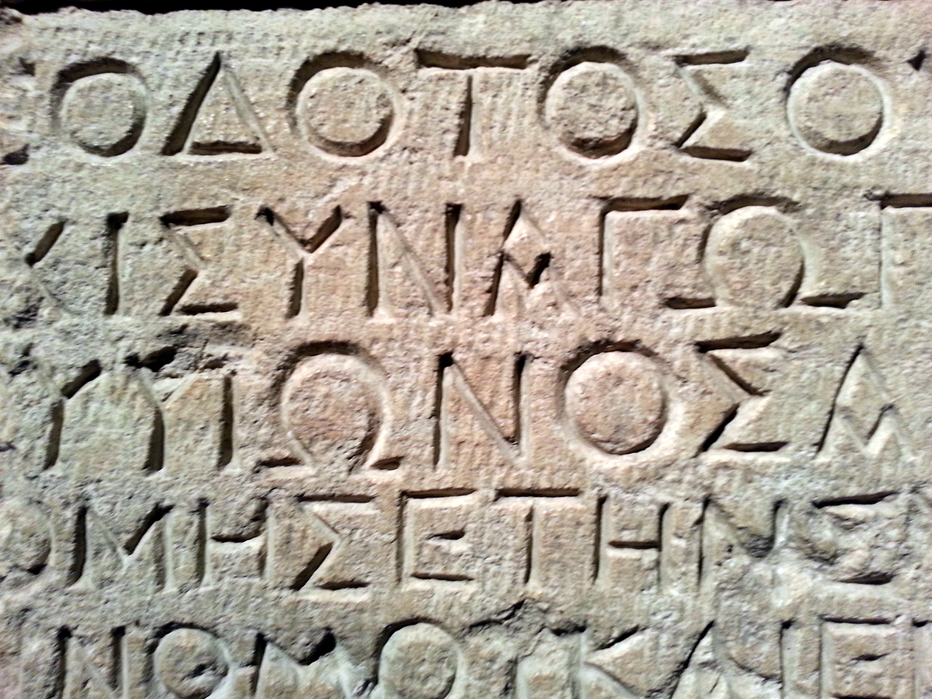 תקריב 1 - העתק כתובת תיאודוטוס. מוצג במוזיאון ישראל בירושלים. הלוח נמצא בירושלים בראשית המאה ה-20 ונלקח למוזאון הארכאולוגי בירושלים